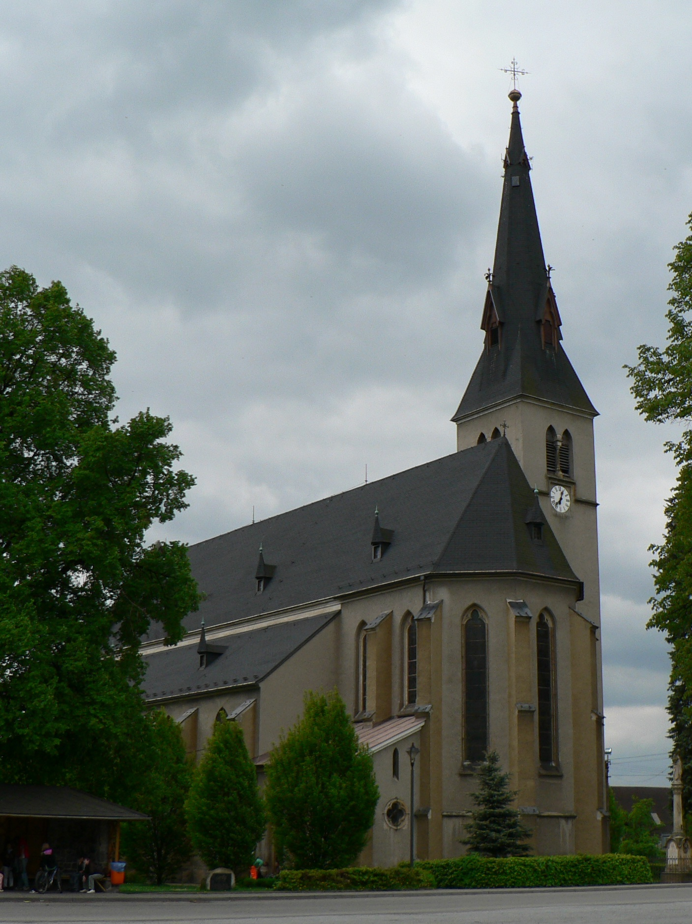 Kostel Nanebevzetí Panny Marie (Rapotín), pohled na presbytář.